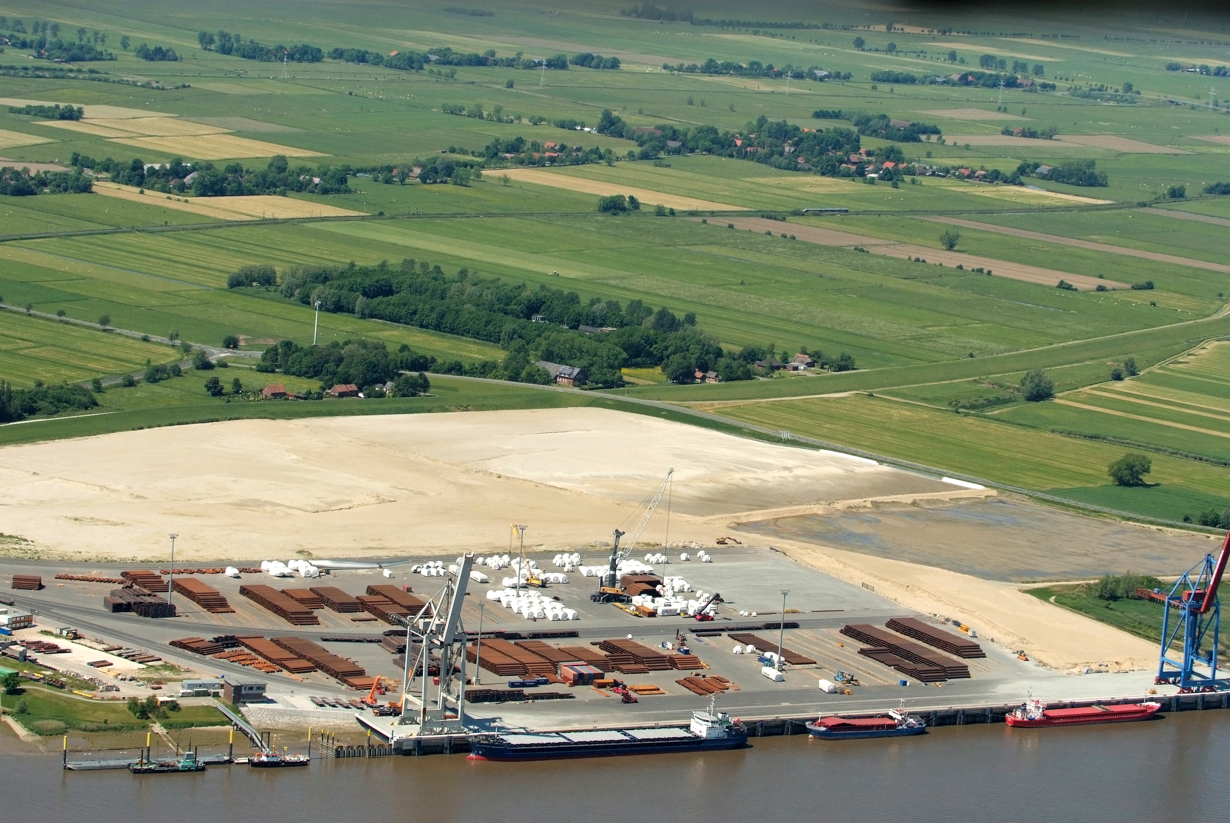 Niedersachsenkai in Brake (Unterweser) Fotoflug vom Flugplatz Nordholz-Spieka über Cuxhaven und Wilhelmshaven